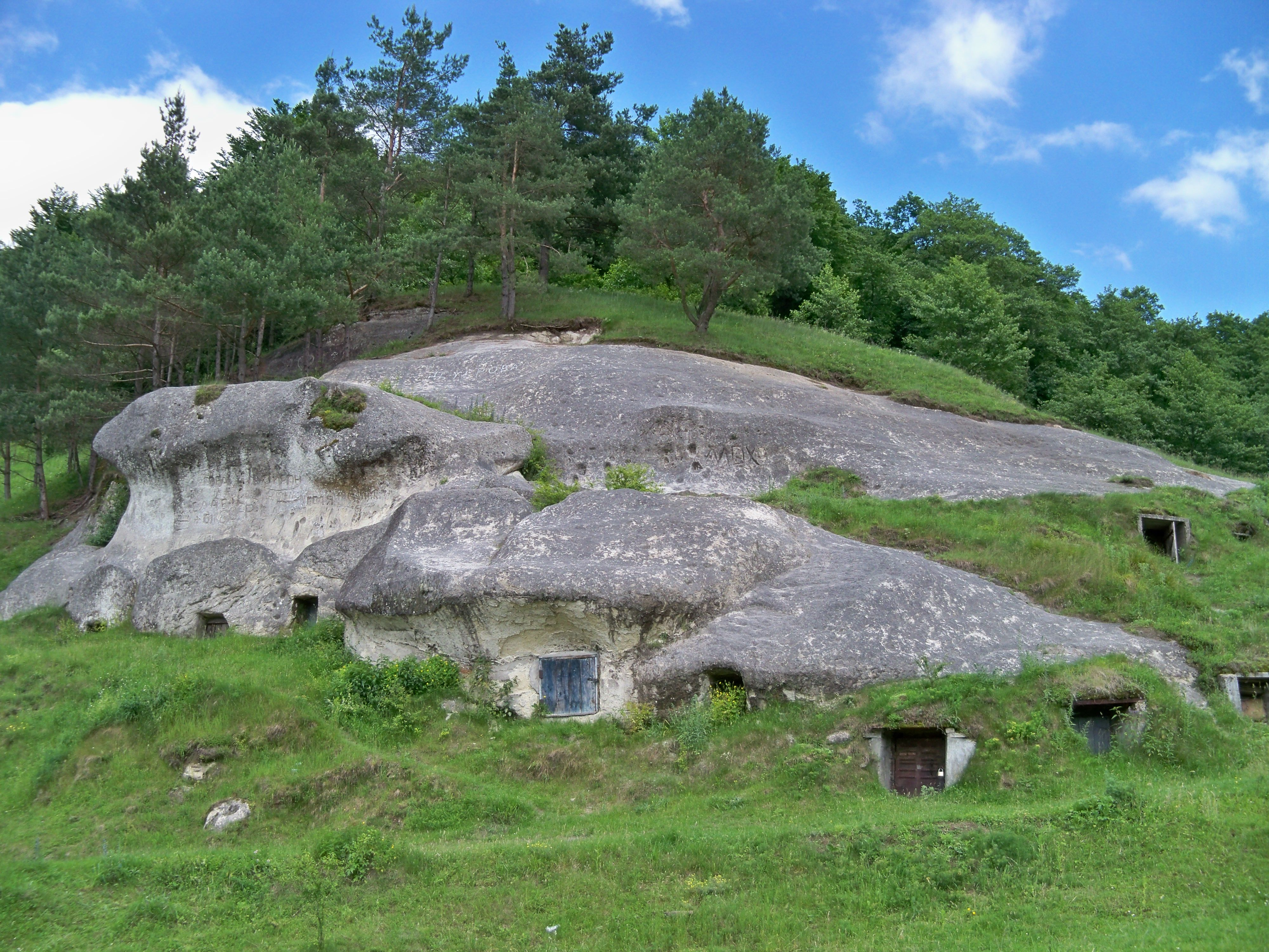 Городище давньоруське, с. Стільсько, на високому березі р. Колодниці